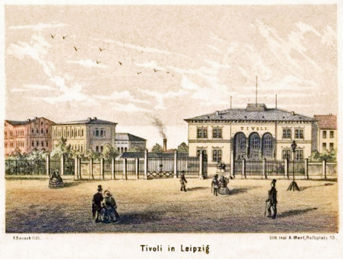 Das Ausflugslokal Tivoli in der Zeitzer Straße in Leipzig. An seiner Stelle wurde 1906 das Volkshaus errichtet.